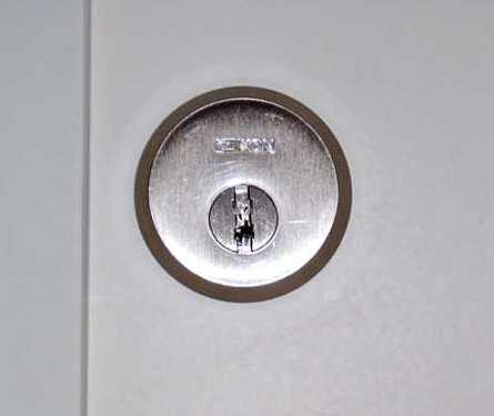 Sicherheitsrosette , Germany.